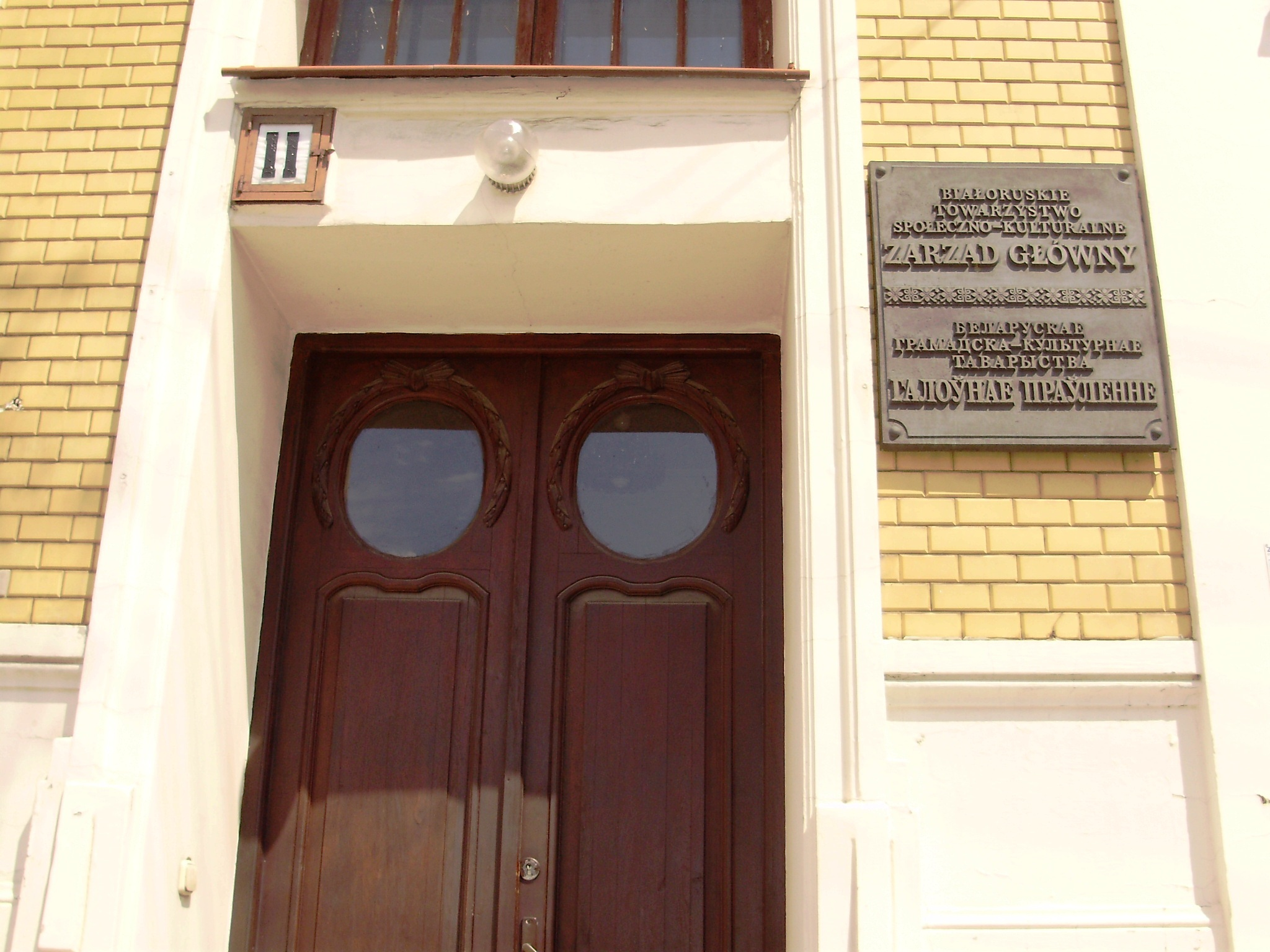 Białystok, ul. Warszawska 11 - wejście do siedziby Białoruskiego Towarzystwa Społeczno-Kulturalnego "BTSK" (zabytek nr A-173 z 30.12.1981)